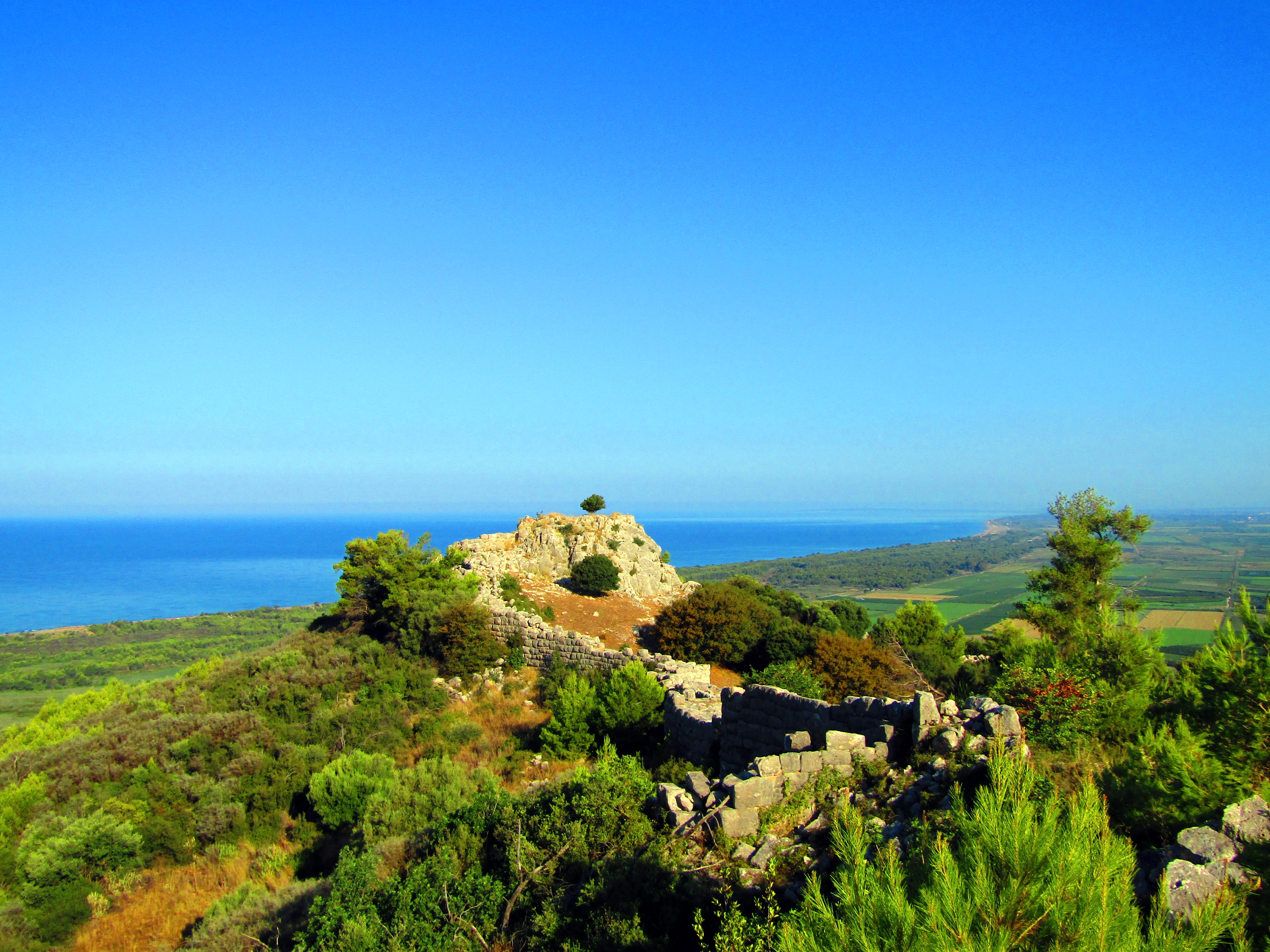 Μέρος του δυτικού τείχους της ακρόπολης του αρχαίου Σαμικού.«Κάστρο Χλεμούτσι»